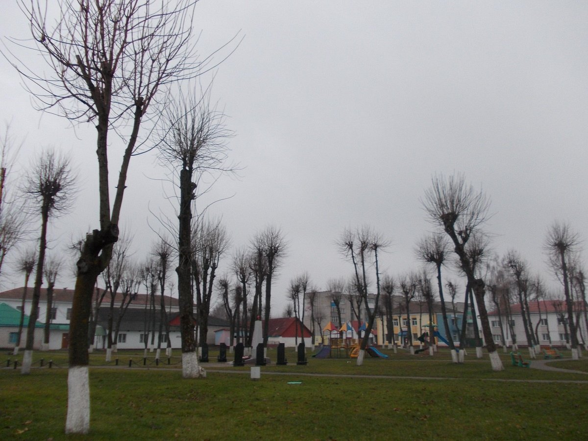 Краснаполле. Цэнтр